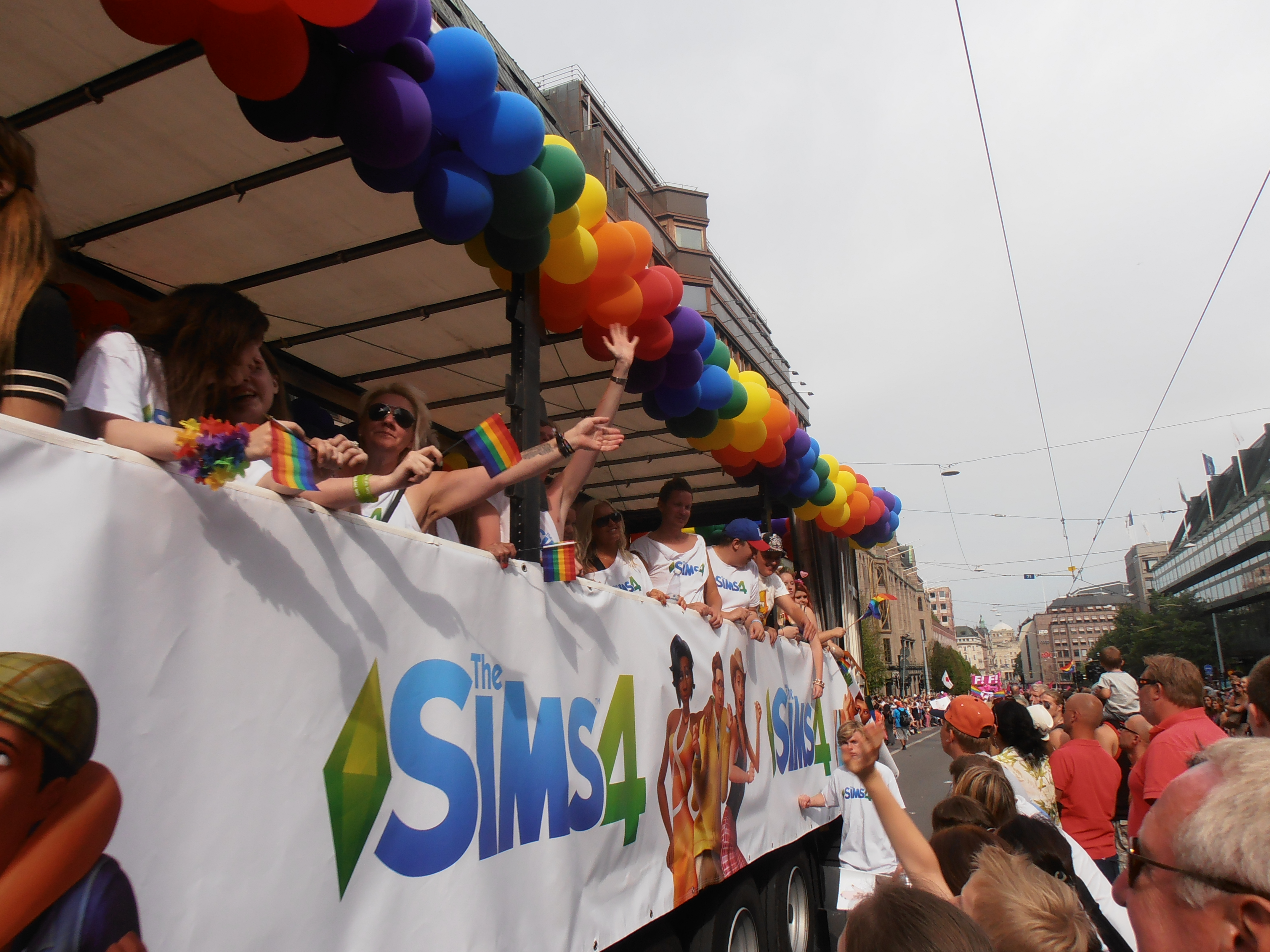 The Sims 4 visar upp sig på Stockholm Pride 2014